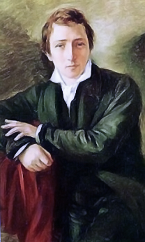 Heinrich Heine, 1831, Kunsthalle Hamburg